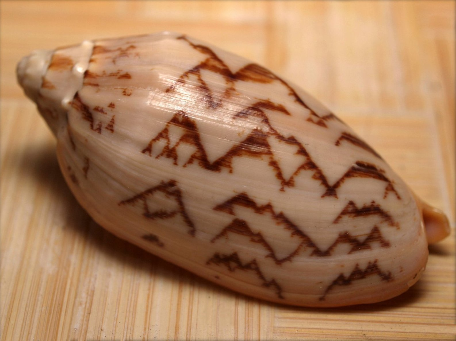 Fledermauswalze — engl.: Bat Volute Philippinen: Kibol Cymbiola vespertilio wird in den Philippinen kommerziell befischt und auf Märkten angeboten.